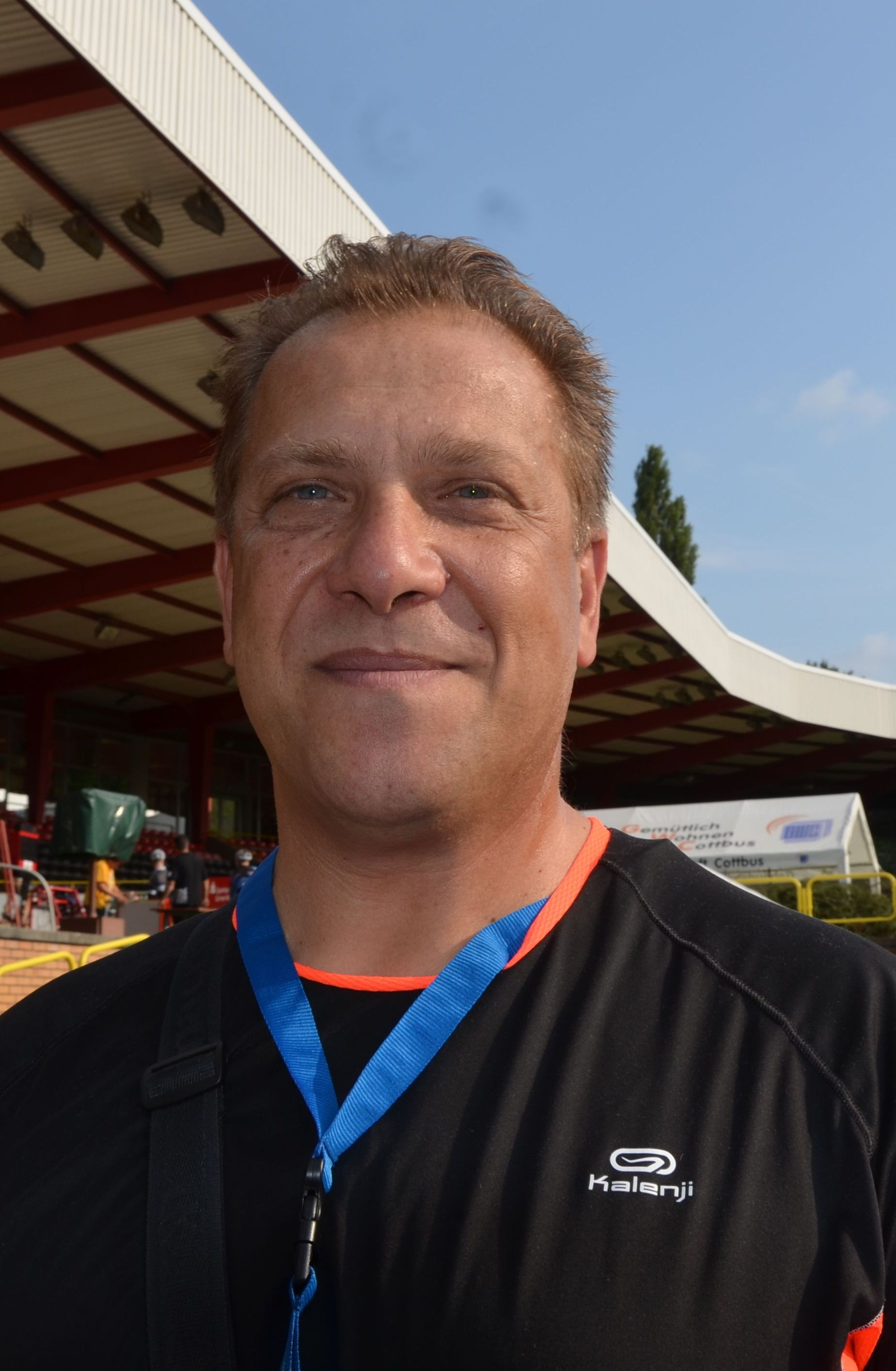 Vincenzo Ceci, italienischer Radsportler The making of this document was supported by the Community-Budget of Wikimedia Germany.